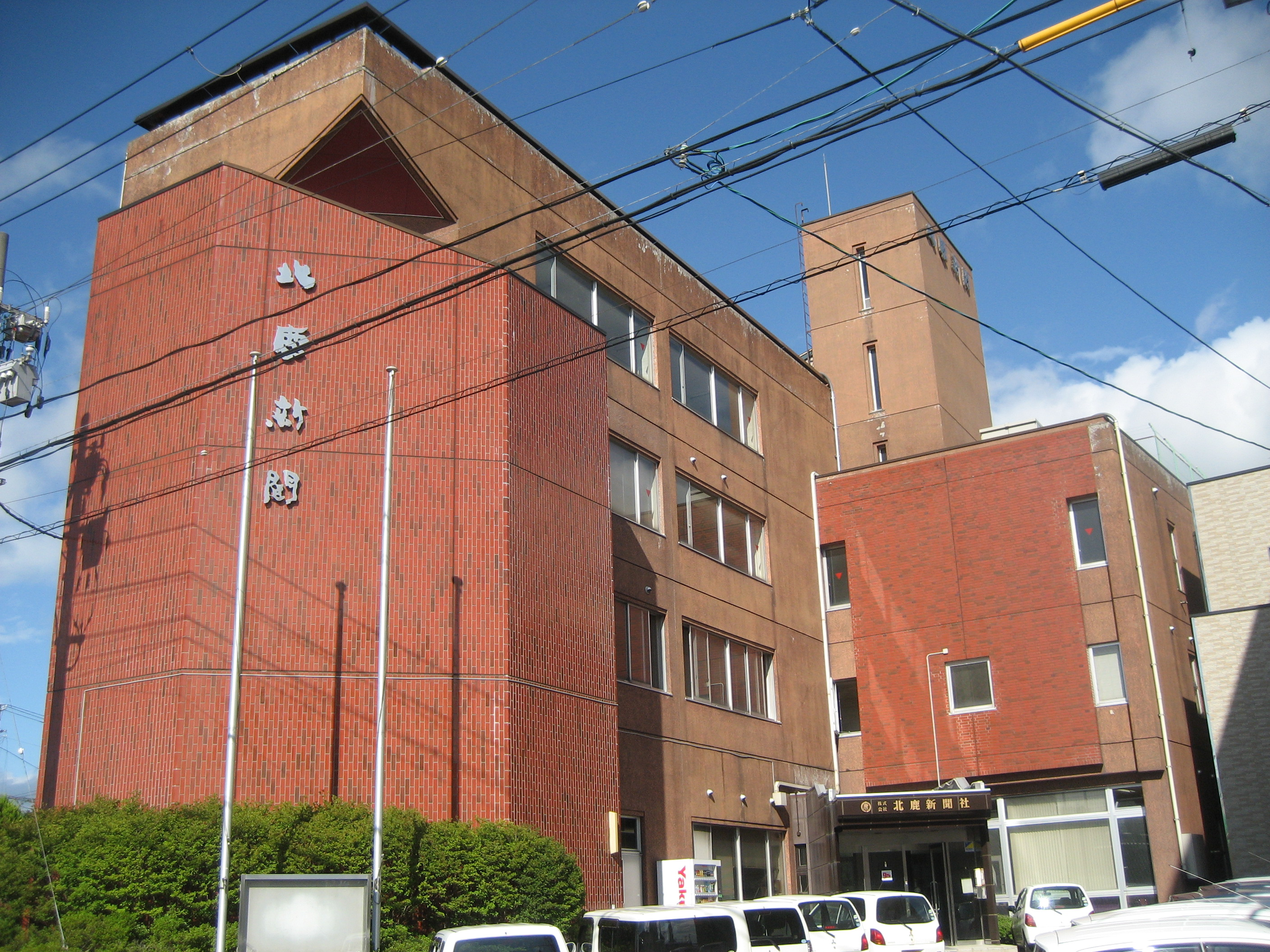 北鹿新聞社社屋